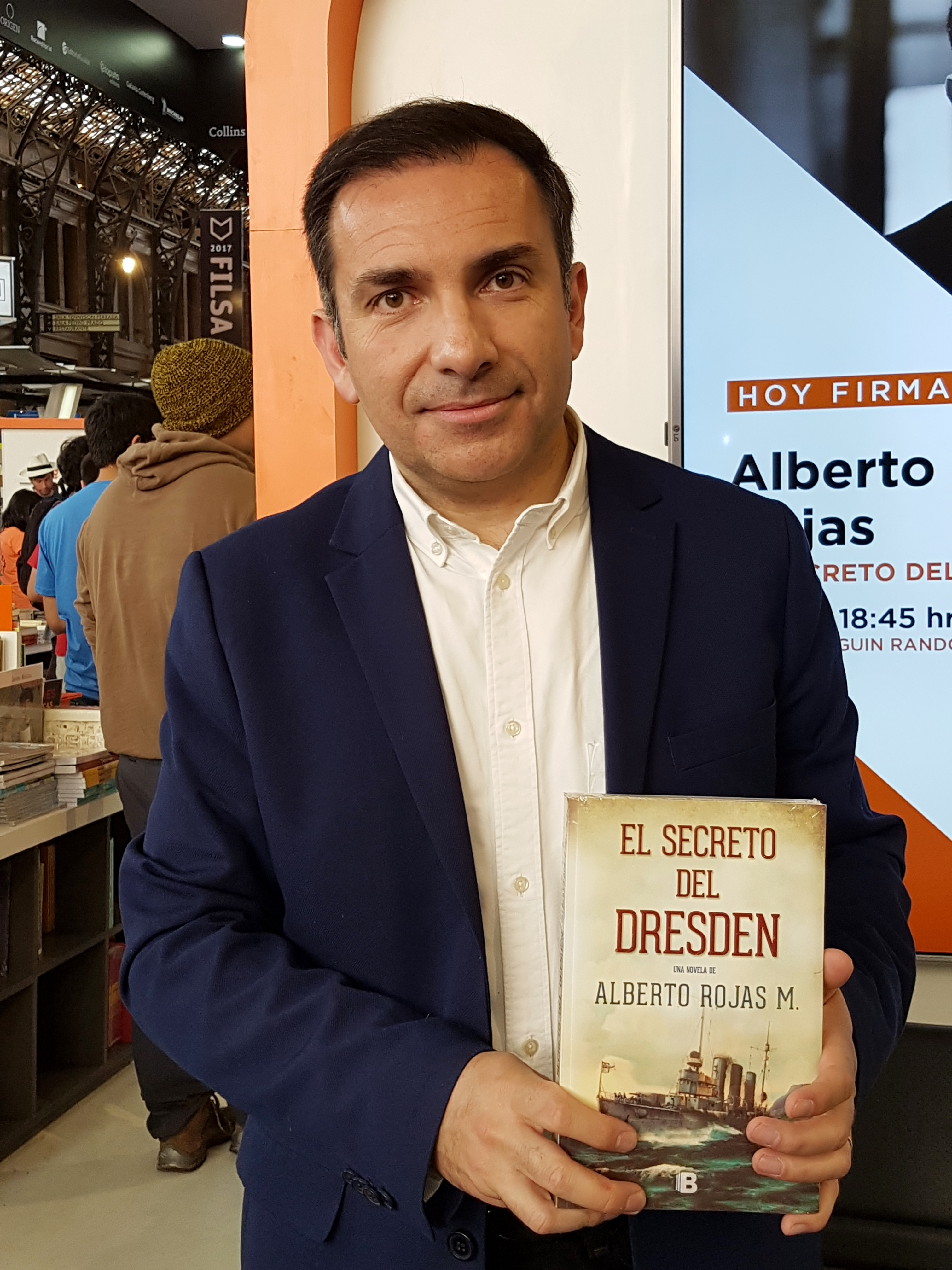 El periodista y escritor chileno Alberto Rojas Moscoso en la Feria Internacional del Libro de Santiago 2017.